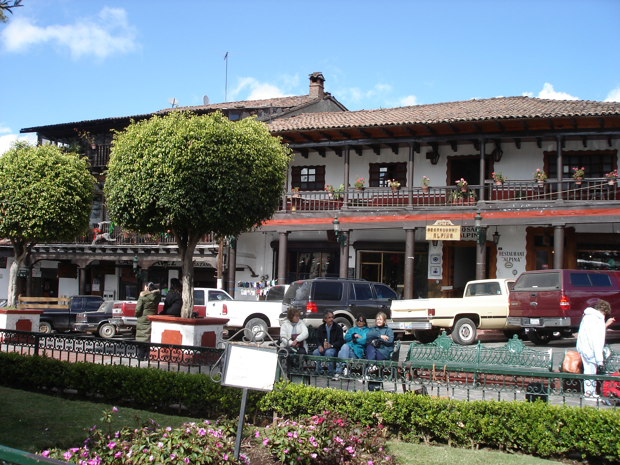 Vista del centro de Mazamitla